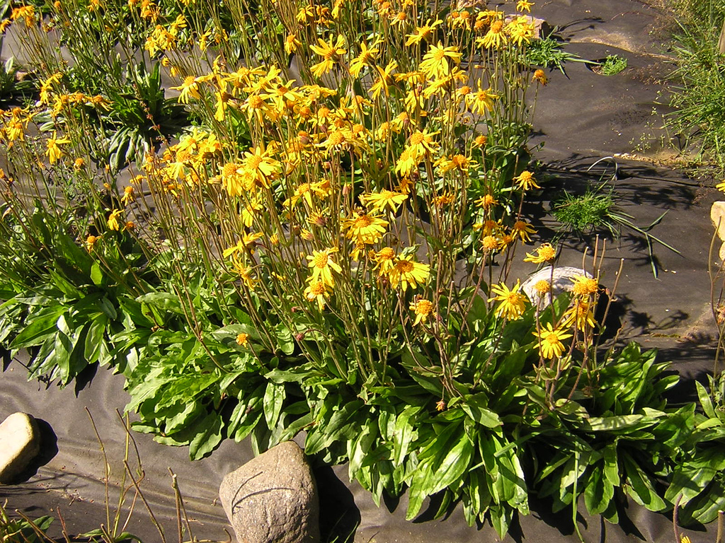 (en) Arnica montana field in Scotland (july 2004) (fr) exemple de culture de Arnica montana en Écosse (juillet 2004). Cette culture est située en Écosse, au nord d'Inverness à environ 150 m d'altitude. Cette culture d'Arnica montana fonctionne sous la forme d'une rotation culturale où pendant quatre années se récoltent quelques dizaines de kilogrammes de capitules secs sur chaque parcelles de 1000m². Cinq parcelles de cette taille ont ainsi un développement échelonné afin de permettre une production de plante entière annuelle d'environ 800 kg frais. Les plants sont cultivés sur des buttées de terre, recouvertes d'une bâche afin de limiter les adventices, avec un espacement d'environ 40 cm. Les plants de culture sont élancés et fins contrairement aux plants sauvages souvent trapus. Les capitules sont récoltés puis séchés, en laissant quelques fleurs pour la récolte des graines. Ces capitules récoltés sont destinés aux laboratoires pharmaceutiques, principalement Weleda.